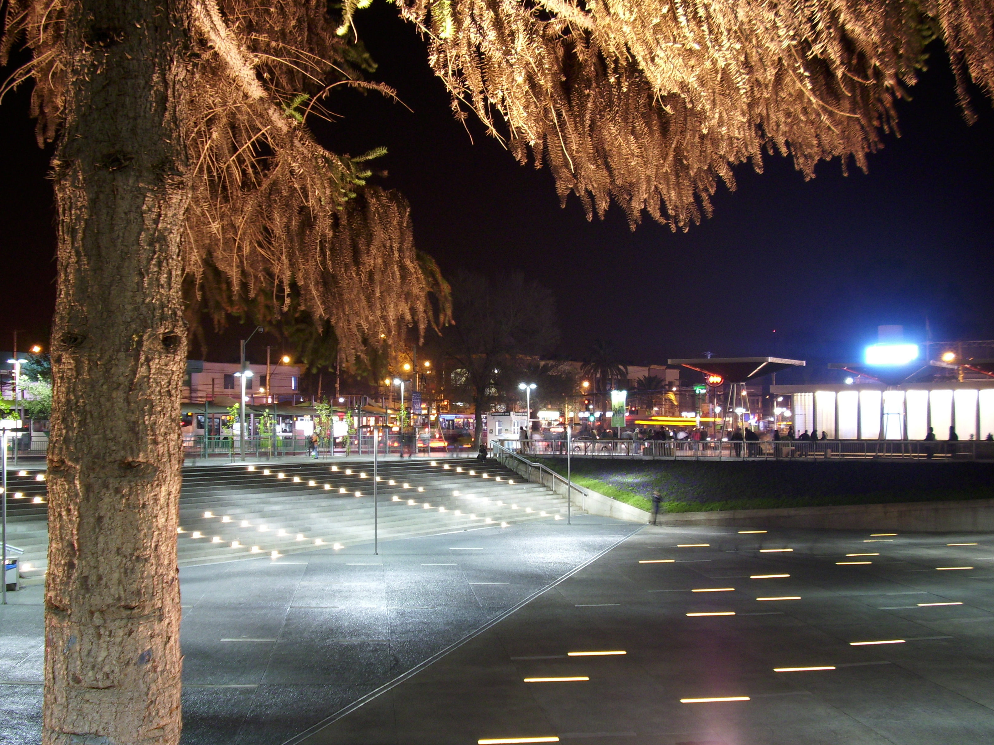 La explanada de la Plaza de Armas de Maipú días después de su inauguración. La Plaza fue remodelada parcialmente con motivo de la llegada del Metro a Maipú. Su diseño corresponde a las compañías LMB y TRI Arquitectura, quienes en el año 2009 ganaron un concurso organizado por la Municpalidad de Maipú y la empresa Metro S.A. La construcción de esta remodelación comenzó en septiembre de 2010 y finalizó en marzo de 2011, siendo inaugurada el 1 de abril de 2011 en una ceremonia que incluyó una presentación del pianista chileno Roberto Bravo.